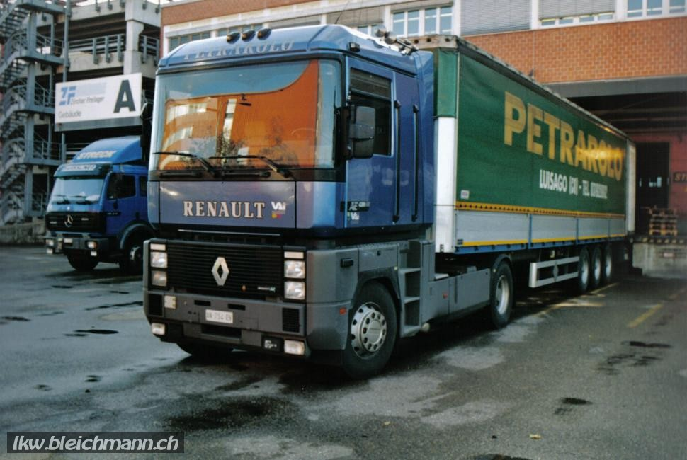 Renault AE